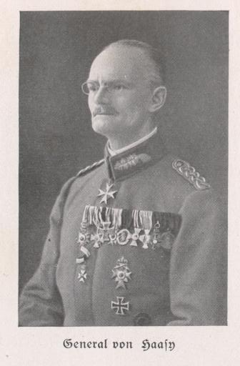 Wilhelm von Haasy (1867-1946) bayerischer Generalleutnant